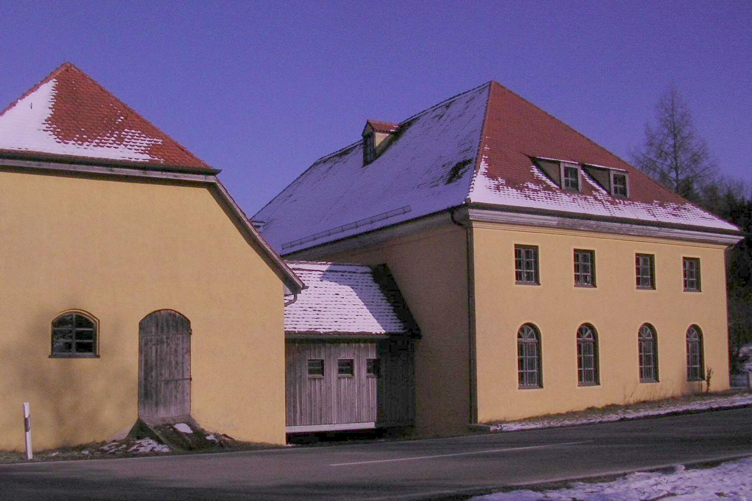 Furthmühle in Oberbayern, Wassermühle, aufgenommen im Winter 2011.